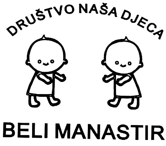 logo: Društvo "Naša djeca" Beli Manastir